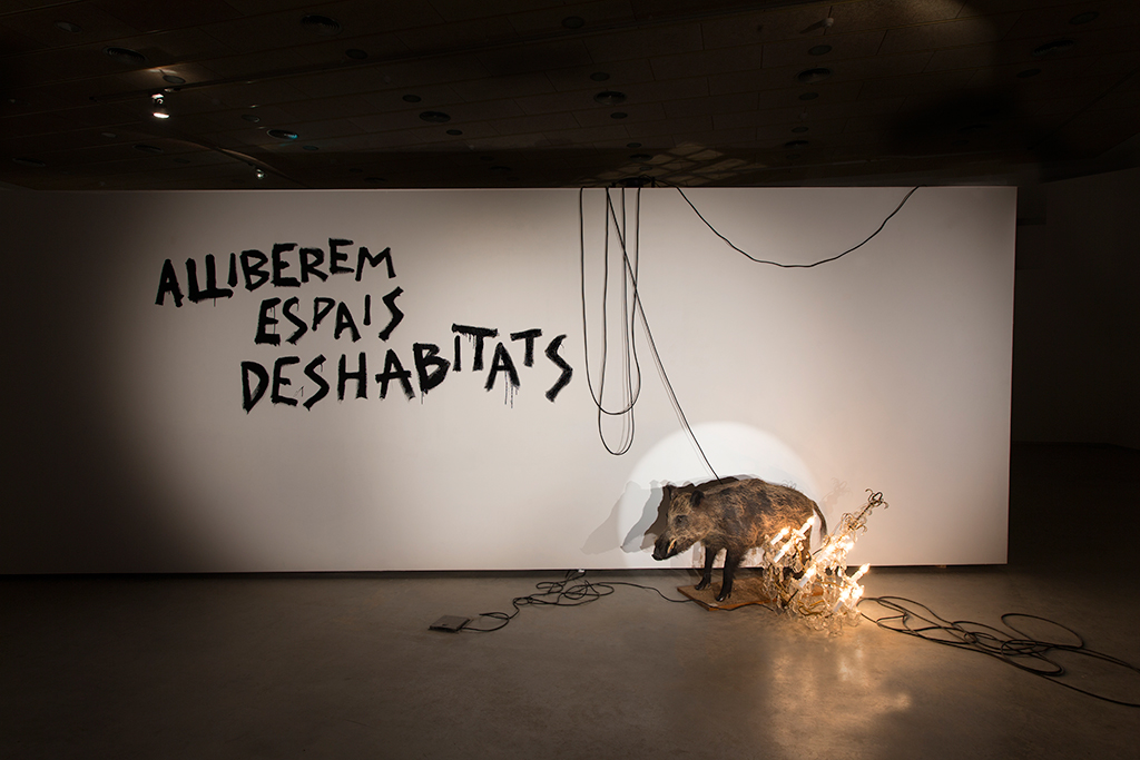 Exposición individual en el Centro de Arte Lo Pati. Amposta, 2015